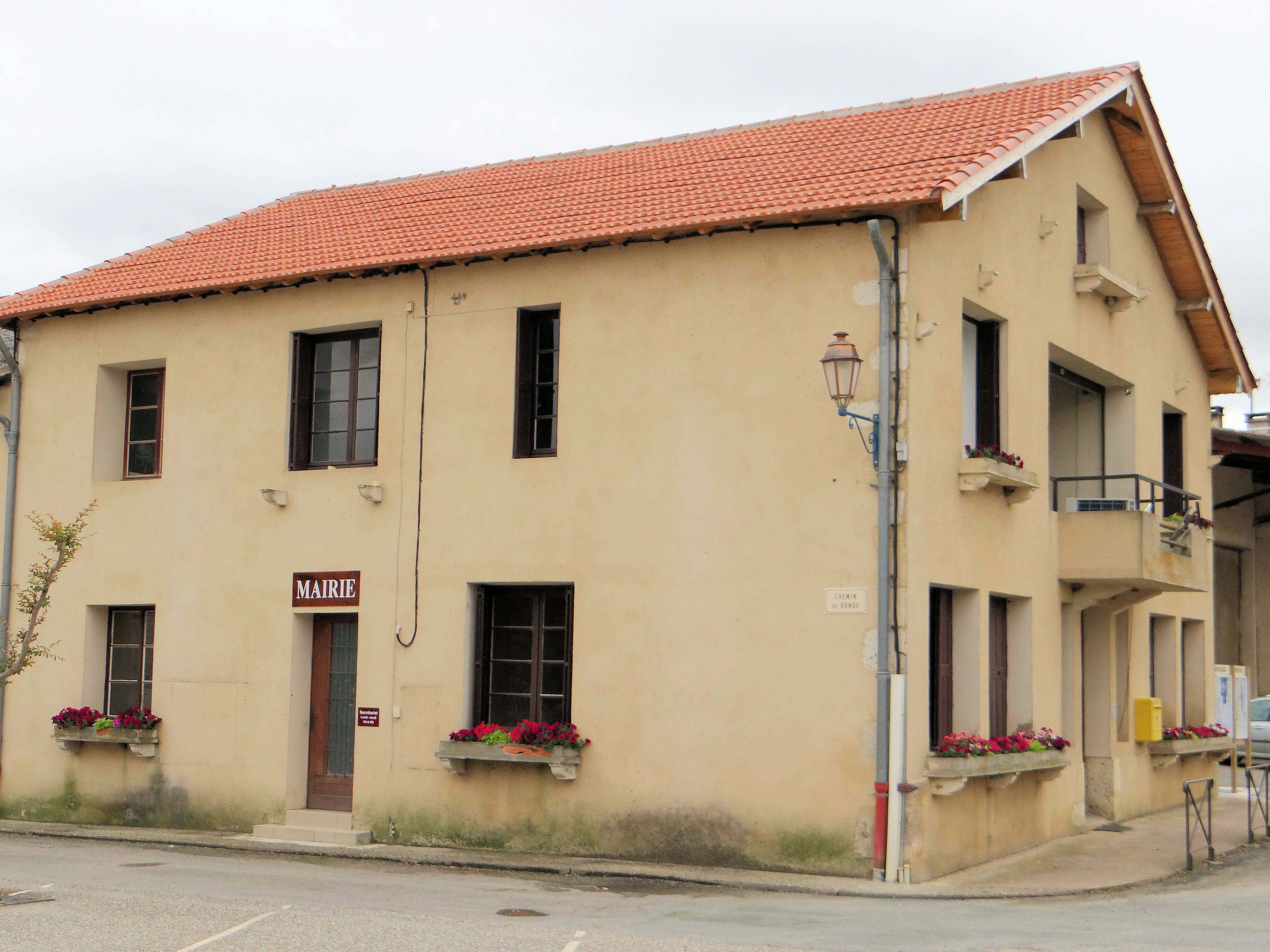 Saint-Antoine (Gers) - Mairie